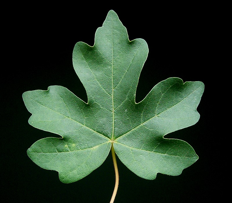 Acer campestre leaf